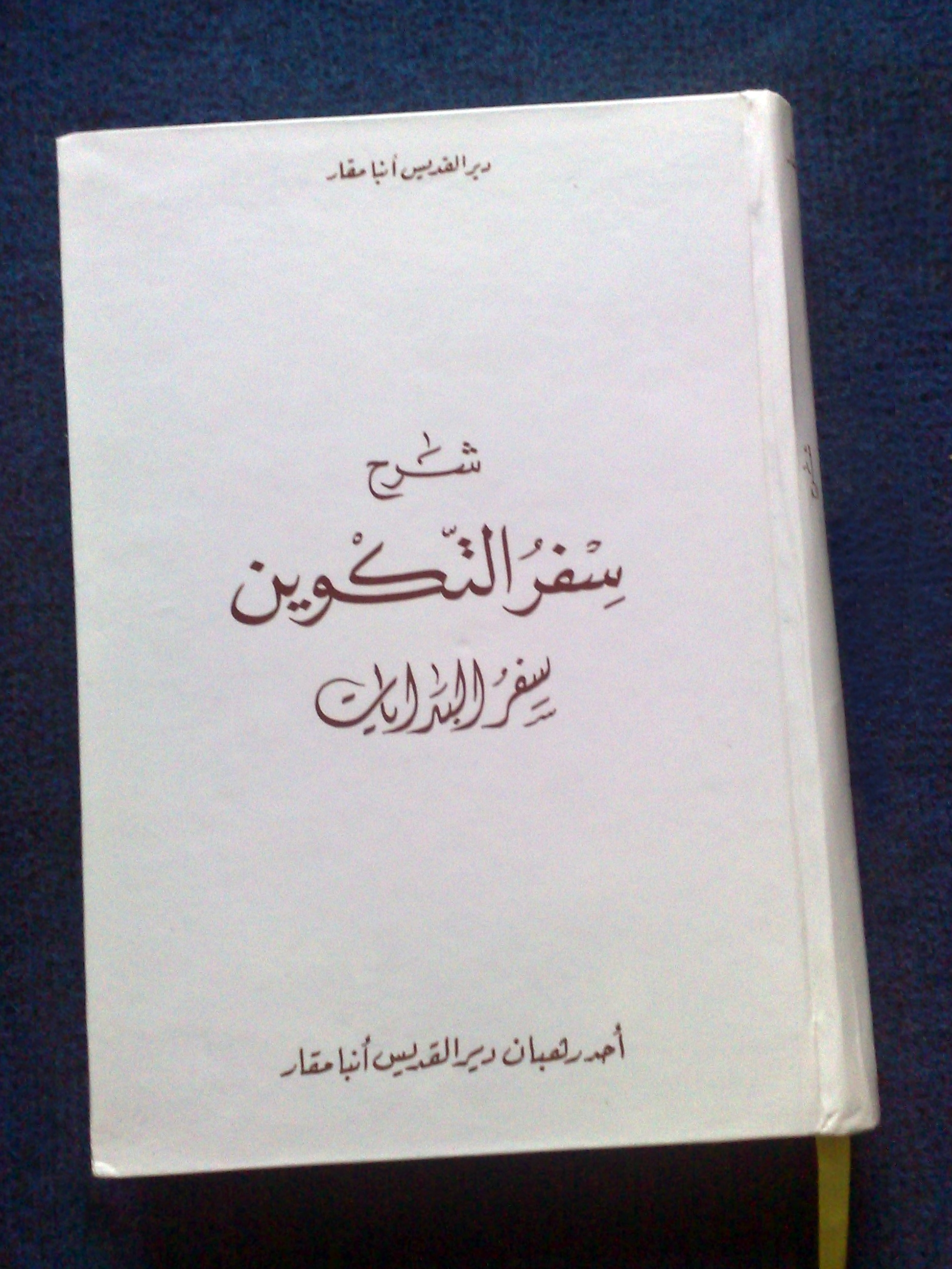 شرح سفر التكوين من إحدى مطبوعات دير الأنبا مقار، وادي النطرون